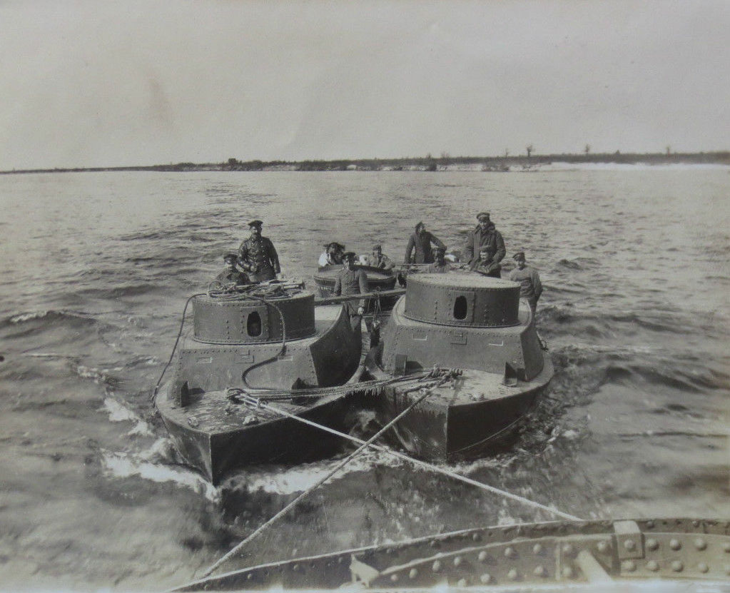 Беларуская (тарашкевіца): Мазыр (Mazyr), рака Прыпяць (Prypiać)